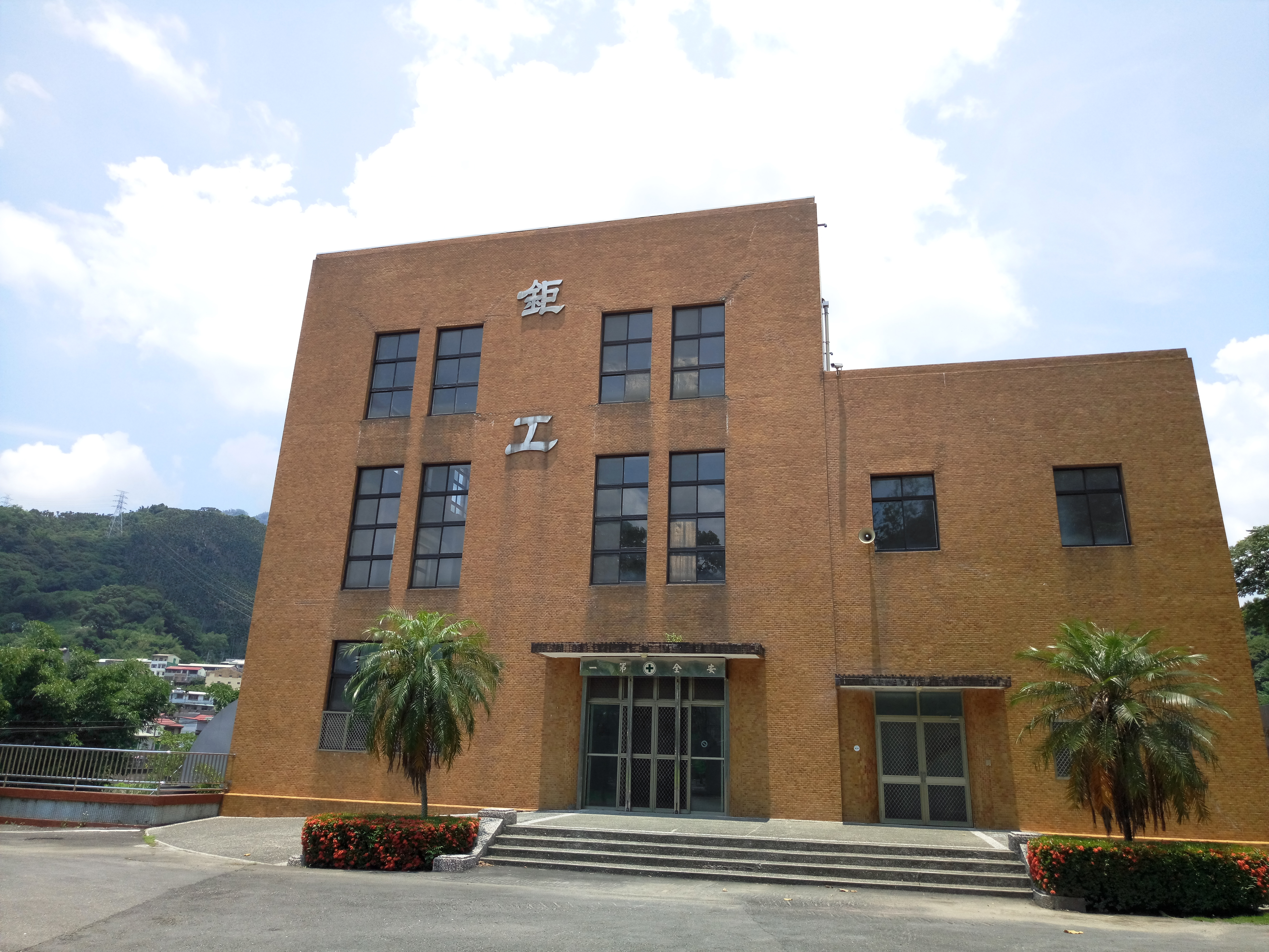 明潭發電廠鉅工分廠廠房外觀